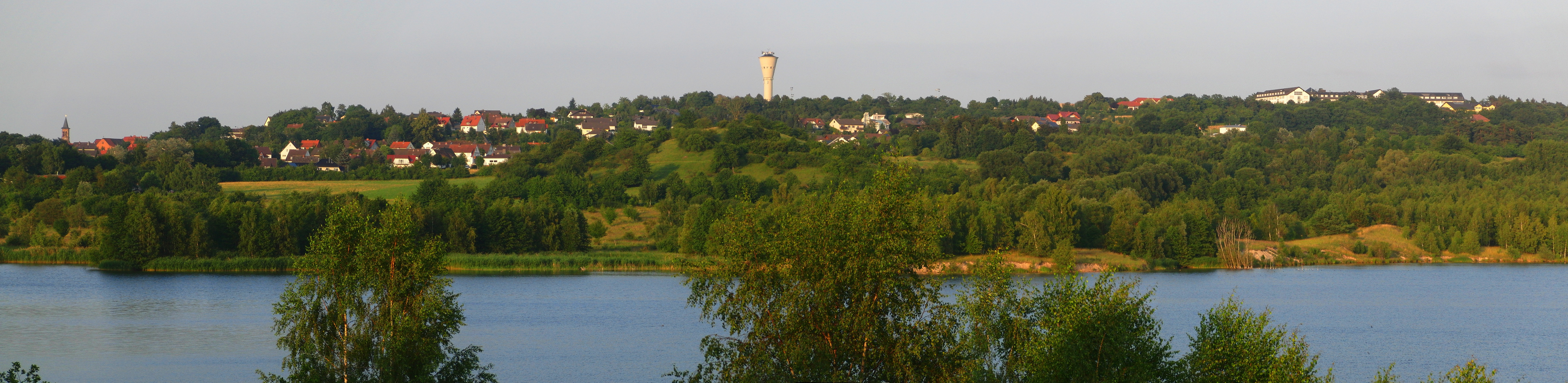 Panorama vom Borkener See (Hessen)